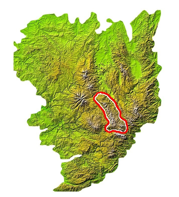 Emplacement des monts de la Margeride sur la carte du Massif Central